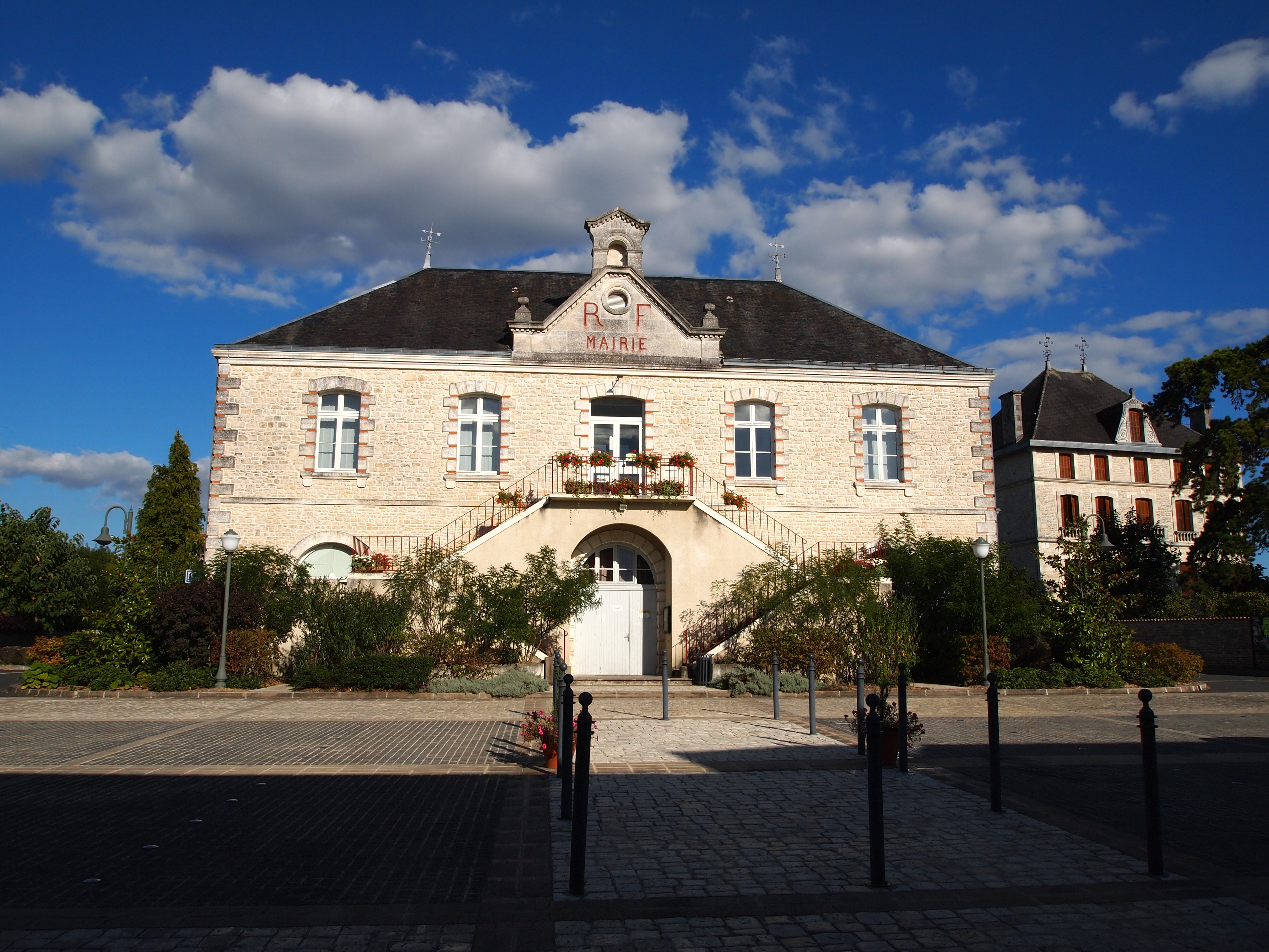 Mairie d'Aunac en Charente (France)